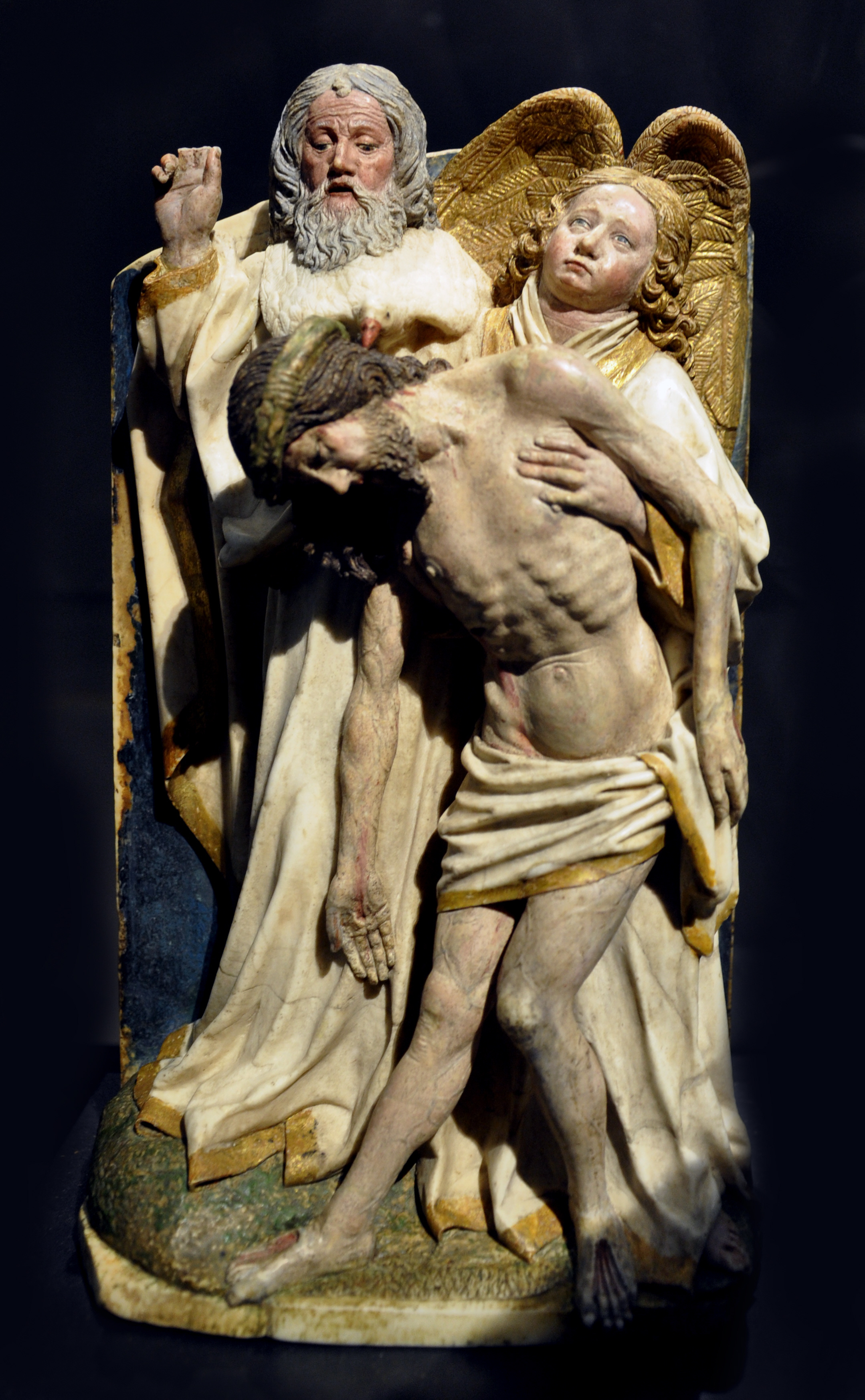 Hans Multscher: Heilige Dreifaltigkeit, Ulm um 1430; Alabaster, barock ergänzt, originale Farbfassung, übergangen; 28.5 cm Liebieghaus, Frankfurt am Main, Inv. Nr. St.P. 401 Weblink